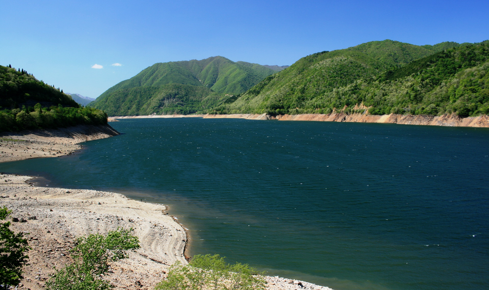 国道156号からの御母衣湖上部